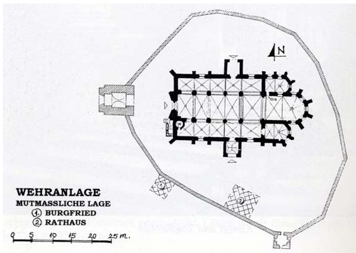 Planul ansamblului fortificatiei de la Richis.